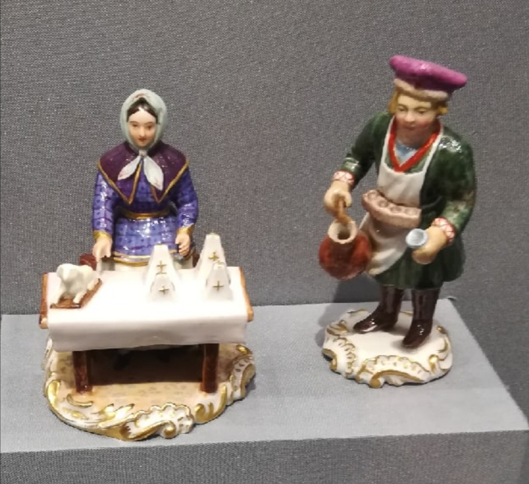 Торговка и разносчик. Фарфор. Россия, первая половина XIX века. На прилавке у торговки пасхи (блюдо из творога) и пасхальный барашек. Музей керамики и усадьба Кусково, Москва, Россия.